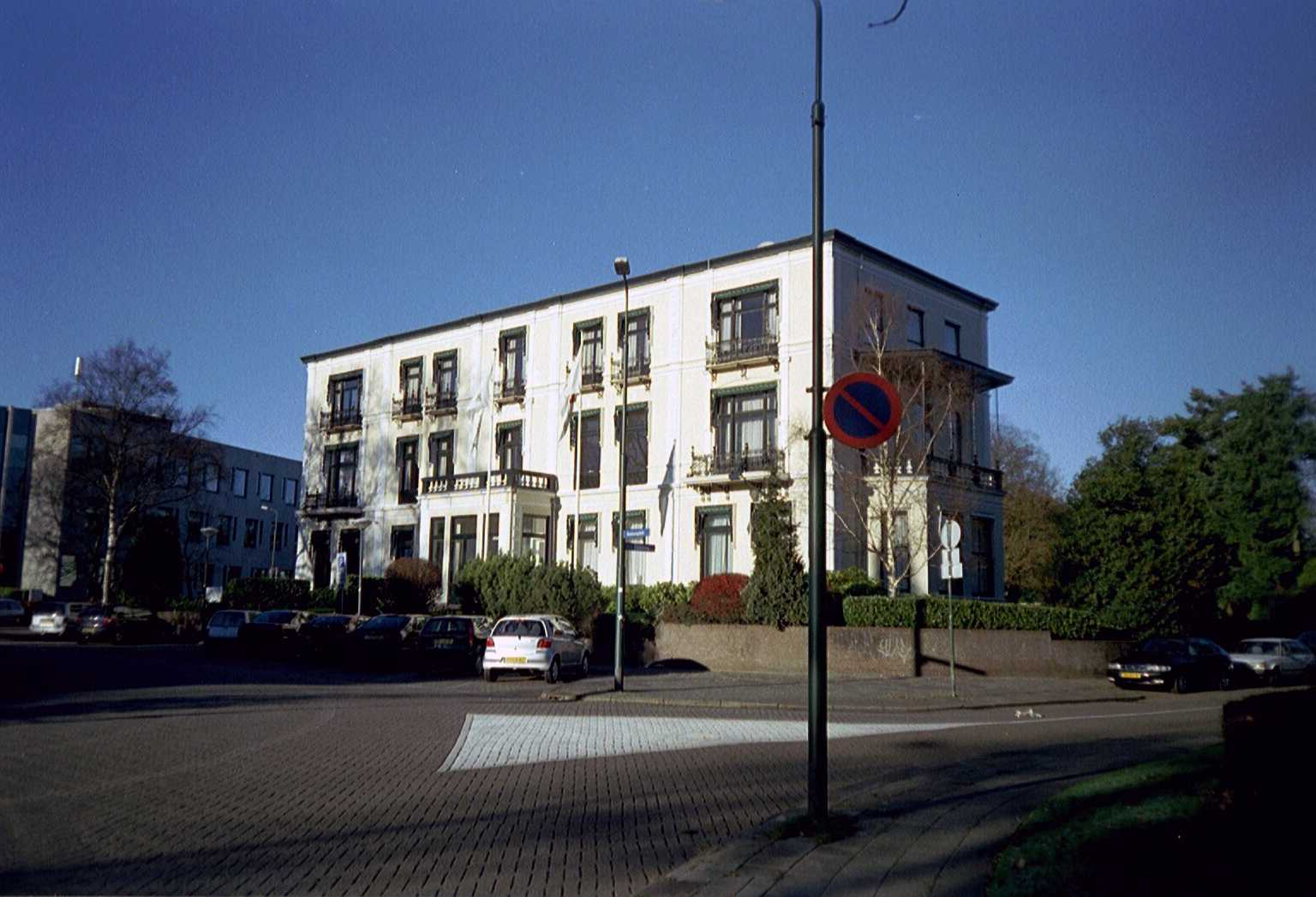 Villa Amalia, Stationsplein 62, Baarn.